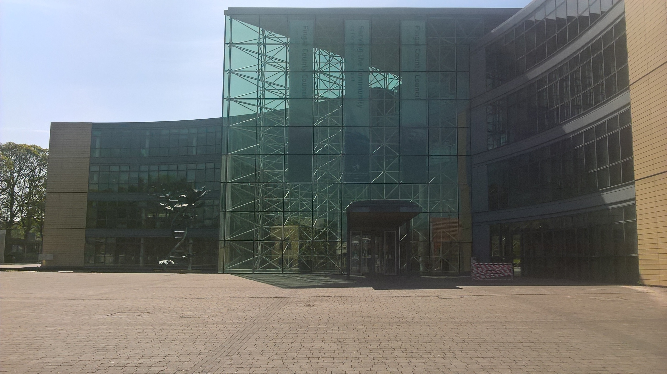 Oifigí Cathartha Comhairle Contae Fhine Gall, Baile Bhlainséir.